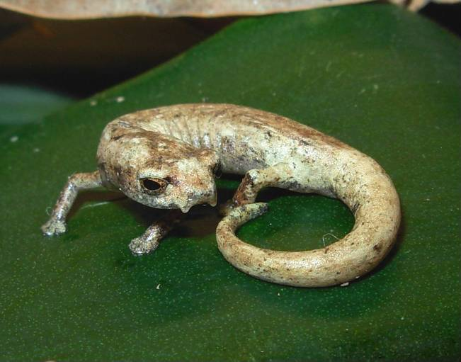 Bolitoglossa lozanoi in La Victoria, Caldas (Colombia)